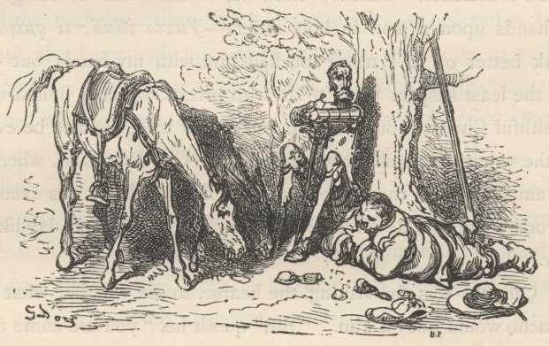 Dom Quixote e Sancho comem e conversam